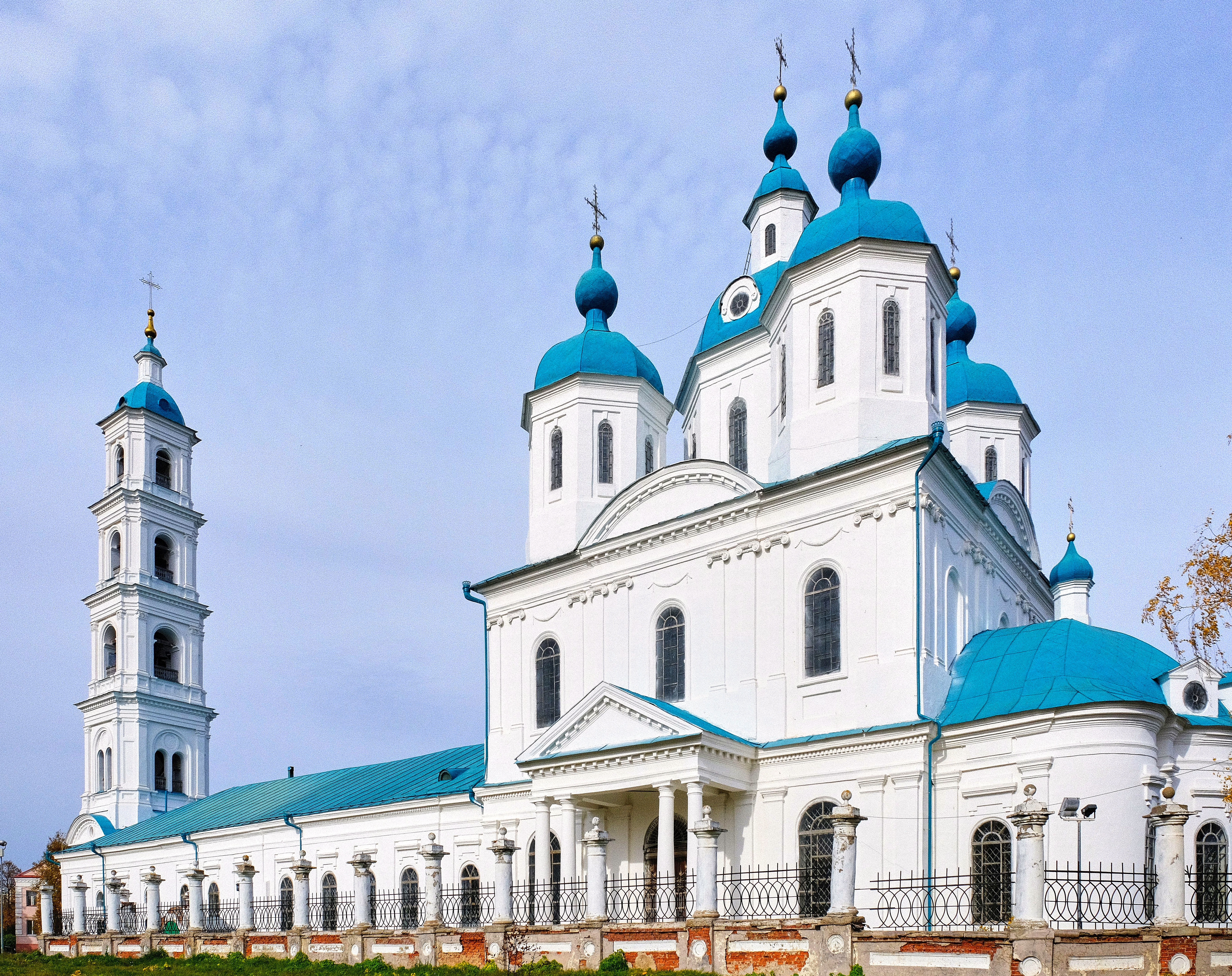 Спасский собор в Елабуге